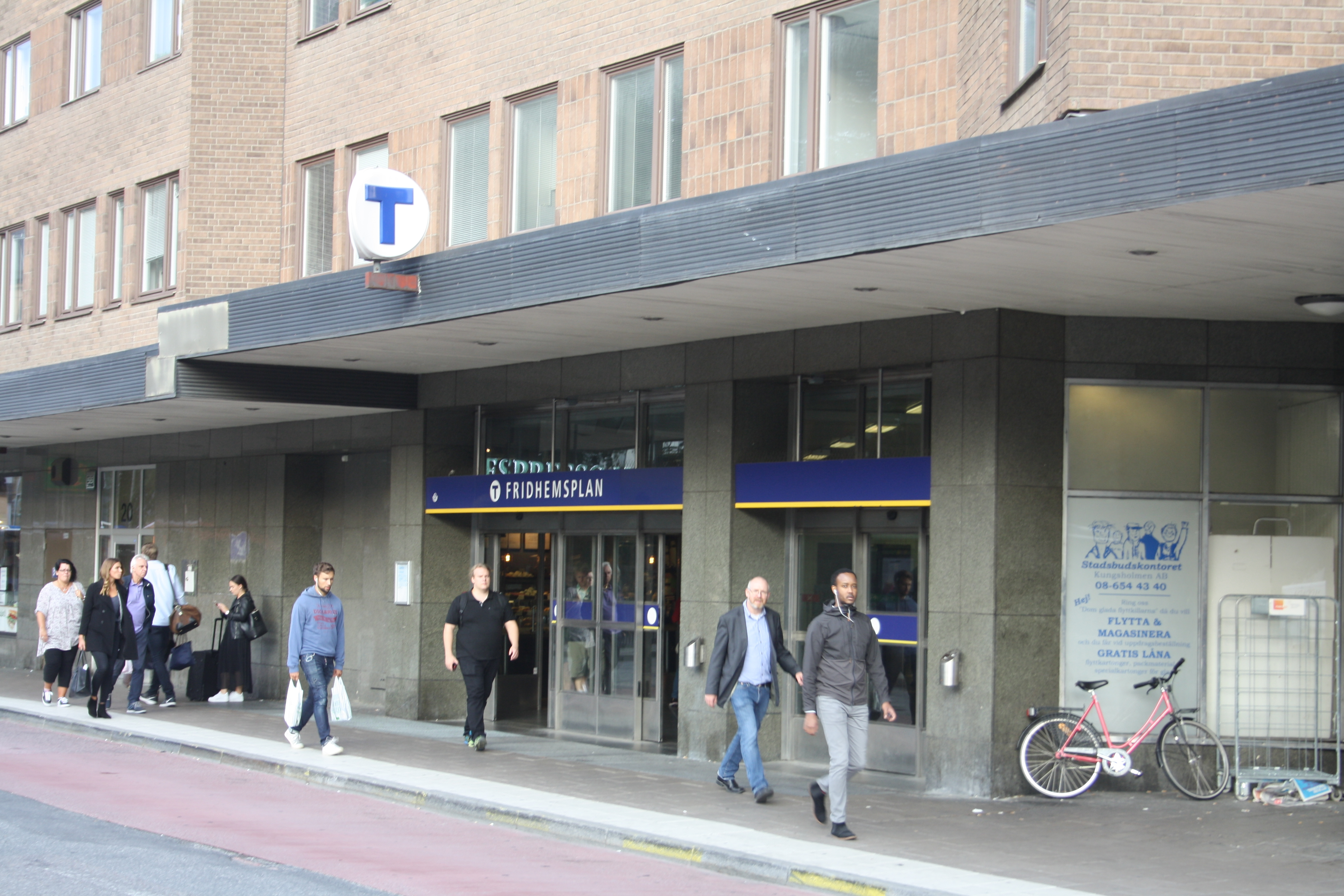 Ingång vid Fridhemsplan